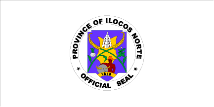 Dit materiaal is afkomstig van of en is door de auteur Jaume Ollé als GFDL beschikbaar gesteld, zie de toestemmingsemail. Hiermee vervallen de strictere voorwaarden in de disclaimers op de genoemde sites.Vrijgegeven bijdrage op Flags of the World van Jaume Olle. Zie deze verklaring op de Spaanstalige Wikipedia. GNU FDL